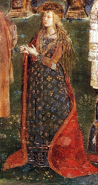 Lucrezia Borgia ritratta nella "Disputa di Santa Caterina" dell'Appartamento Borgia, nella Sala dei Santi in Vaticano.